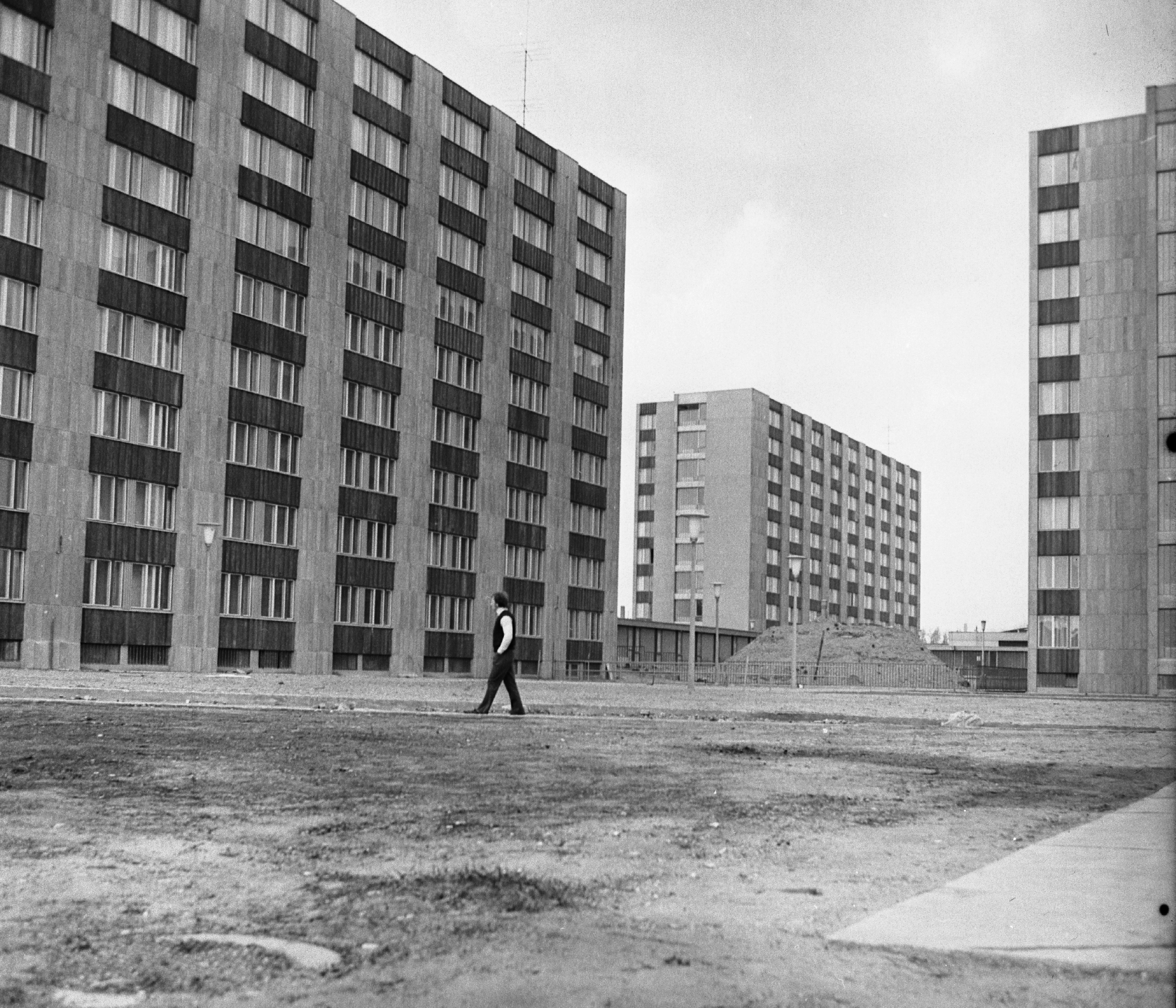 Maglódi út 24., munkásszálló (ma börtön). Location: Hungary, Budapest X. Tags: Budapest Title: Maglódi út 24., munkásszálló (ma börtön).